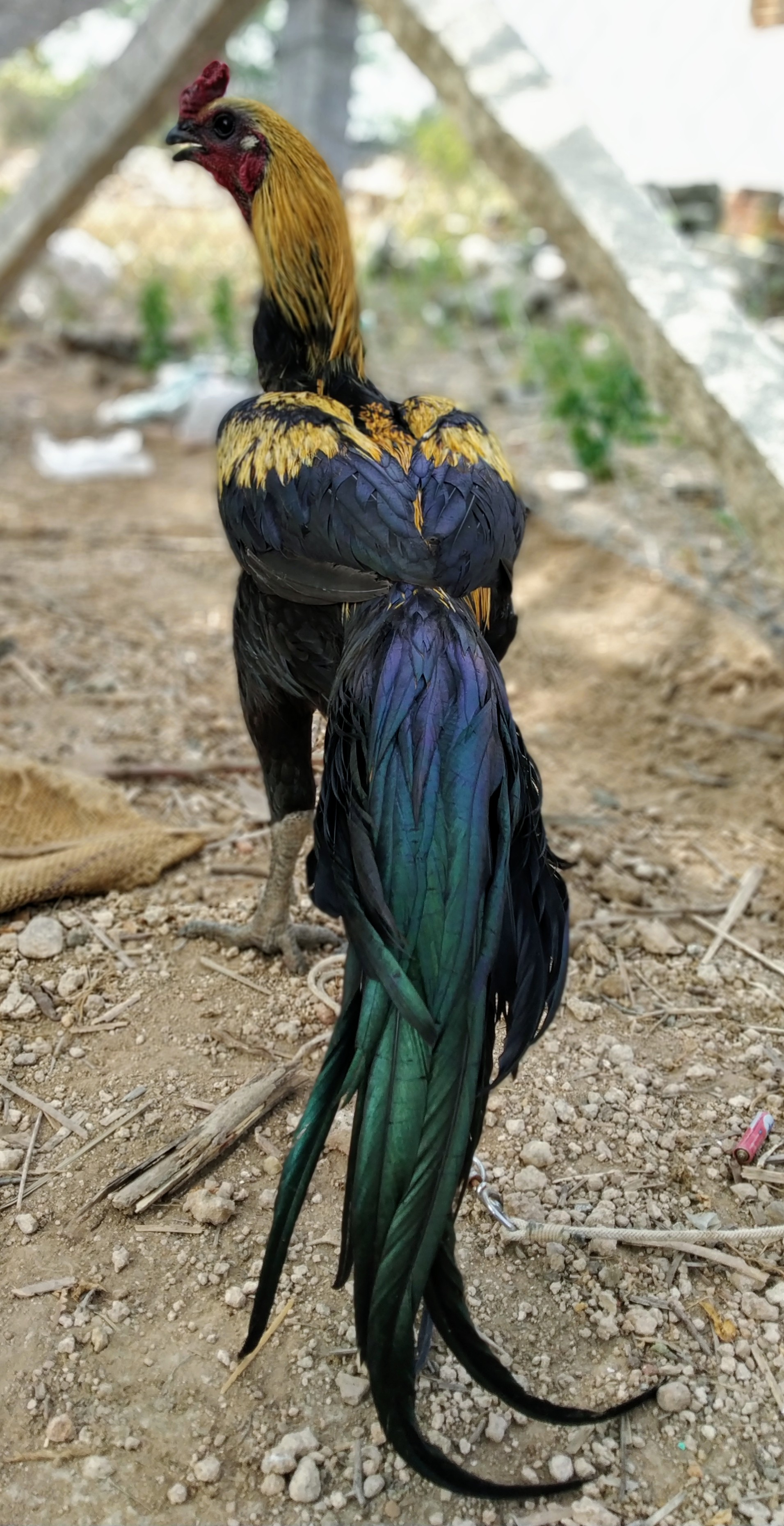 சங்ககிரி சேவல்கள் என்பது கருங்கண், கருங்கால் கொண்டவை. இதன் தோல் பகுதி கருமையாக இருக்கும். அதனால் சங்ககிரி கருஞ்சதை என்பார்கள்.